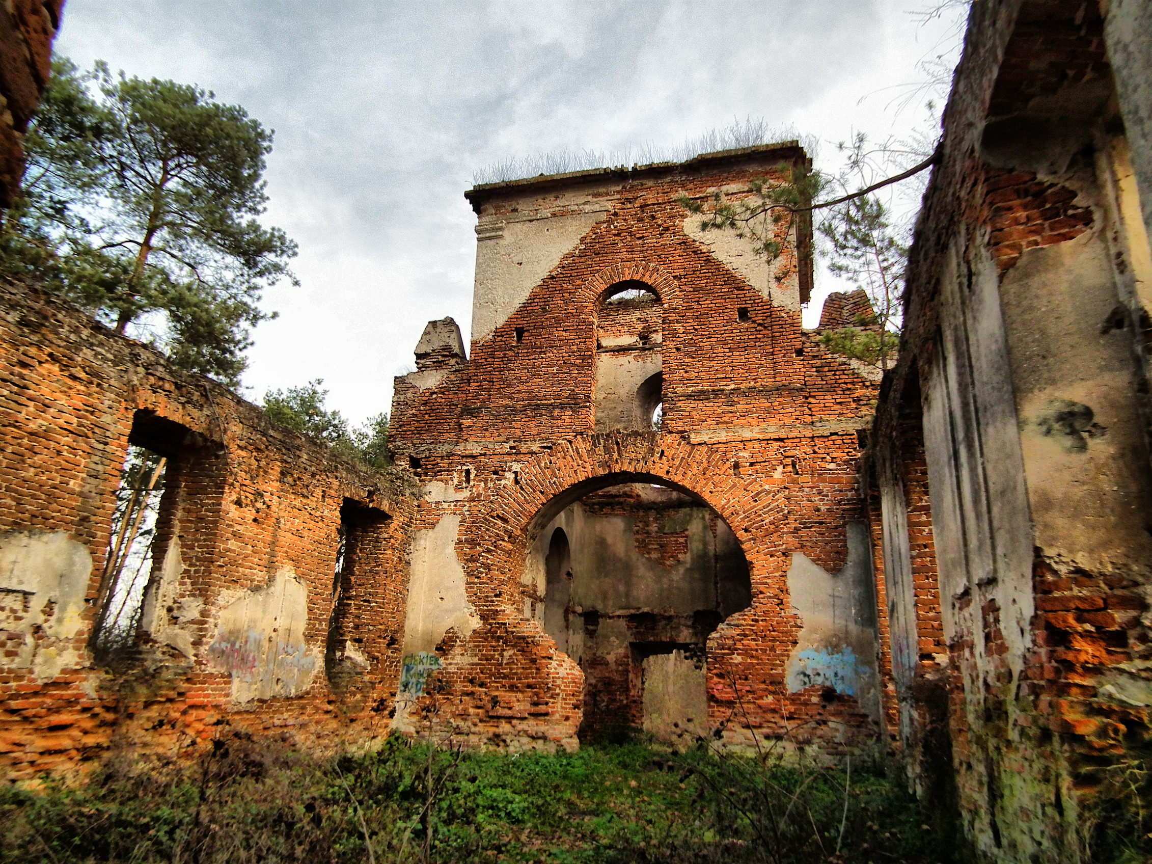 Ruiny zboru kalwińskiego w Piaskach – dawny zbór ewangelicko-reformowany mieszczący się w mieście Piaski. Obecnie znajduje się w stanie ruiny.